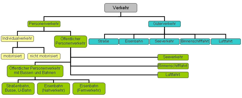 Verkehrsarten nach Güter- und Personenverkehr